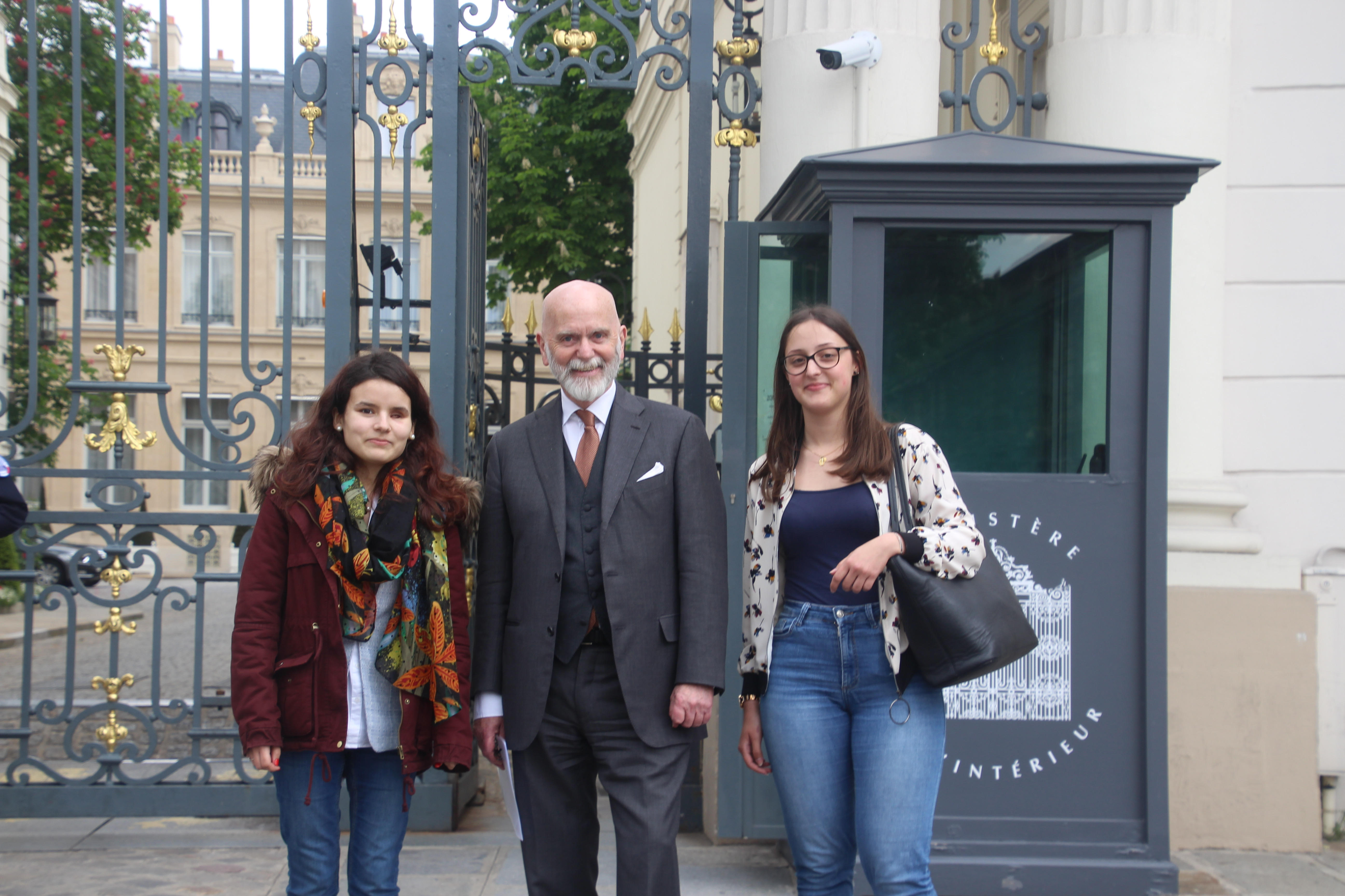 Renaud Camus, tête de liste pour La Ligne claire, avec Fiorina Lignier, n°2 de la liste, et Clara Buhl, n° 22, devant le ministère de l’Intérieur.